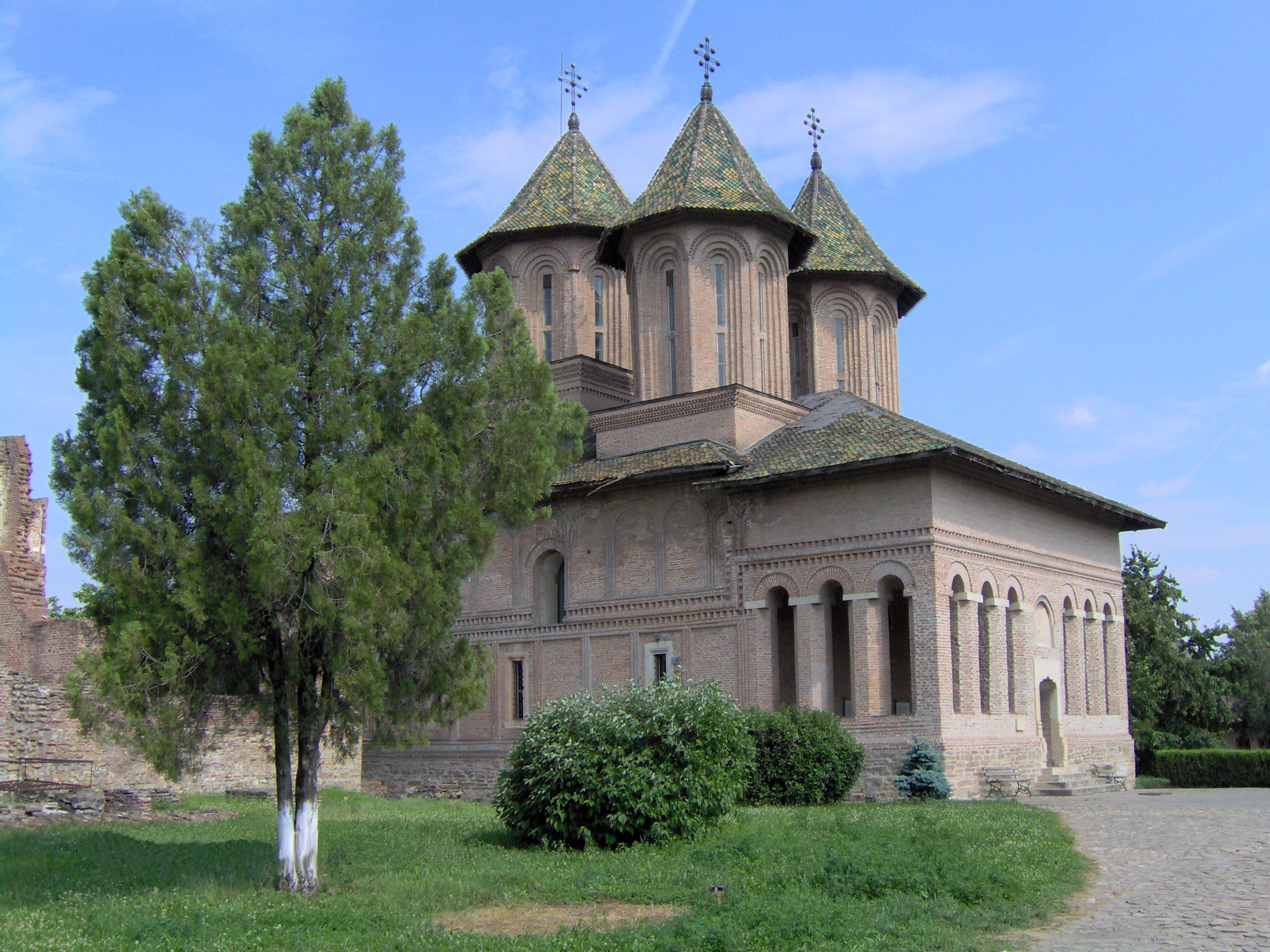 Biserica domneasca din Targoviste